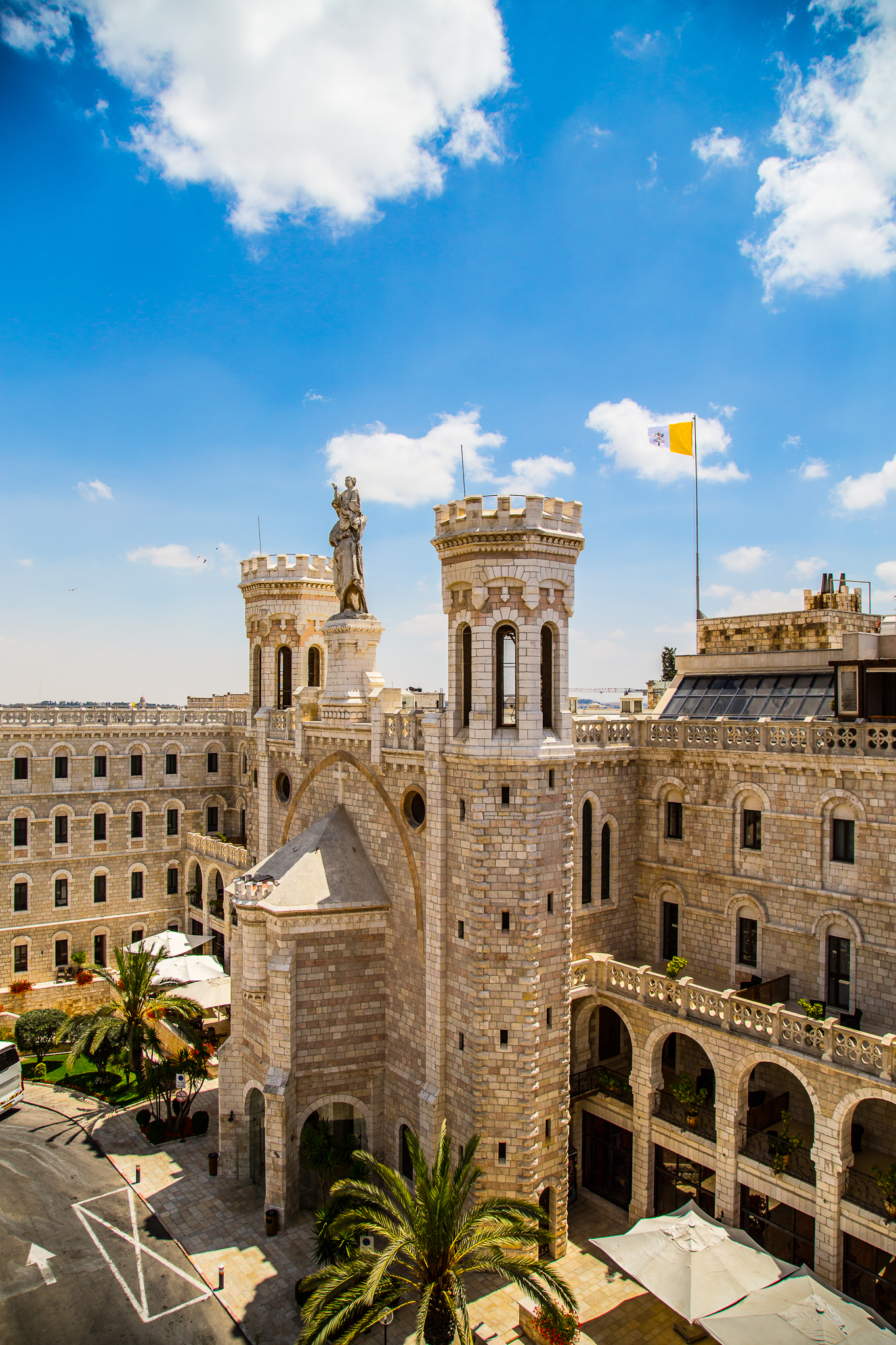 אכסניית נוטרדאם דה פרנס היא מבנה סמוך לכיכר צה"ל, שנבנה על ידי הרוזן הצרפתי מרי דה פְּייֶלָא, כחלק ממכלול מבנים ובהם בית חולים ושני מנזרים. שימש לאירוח צליינים, ומ-1970 שימש כמעונות סטודנטים. כיום משמש מלון, מנזר נוטרדאם דה ג'רוזלם. המבנה גבוה וסימטרי, וכולל קפלה במרכז ושני אגפים ממערב וממזרח. מעל הקפלה שני מגדלים בסגנון הבארוק, וביניהם פסל מריה אוחזת בישו התינוק.